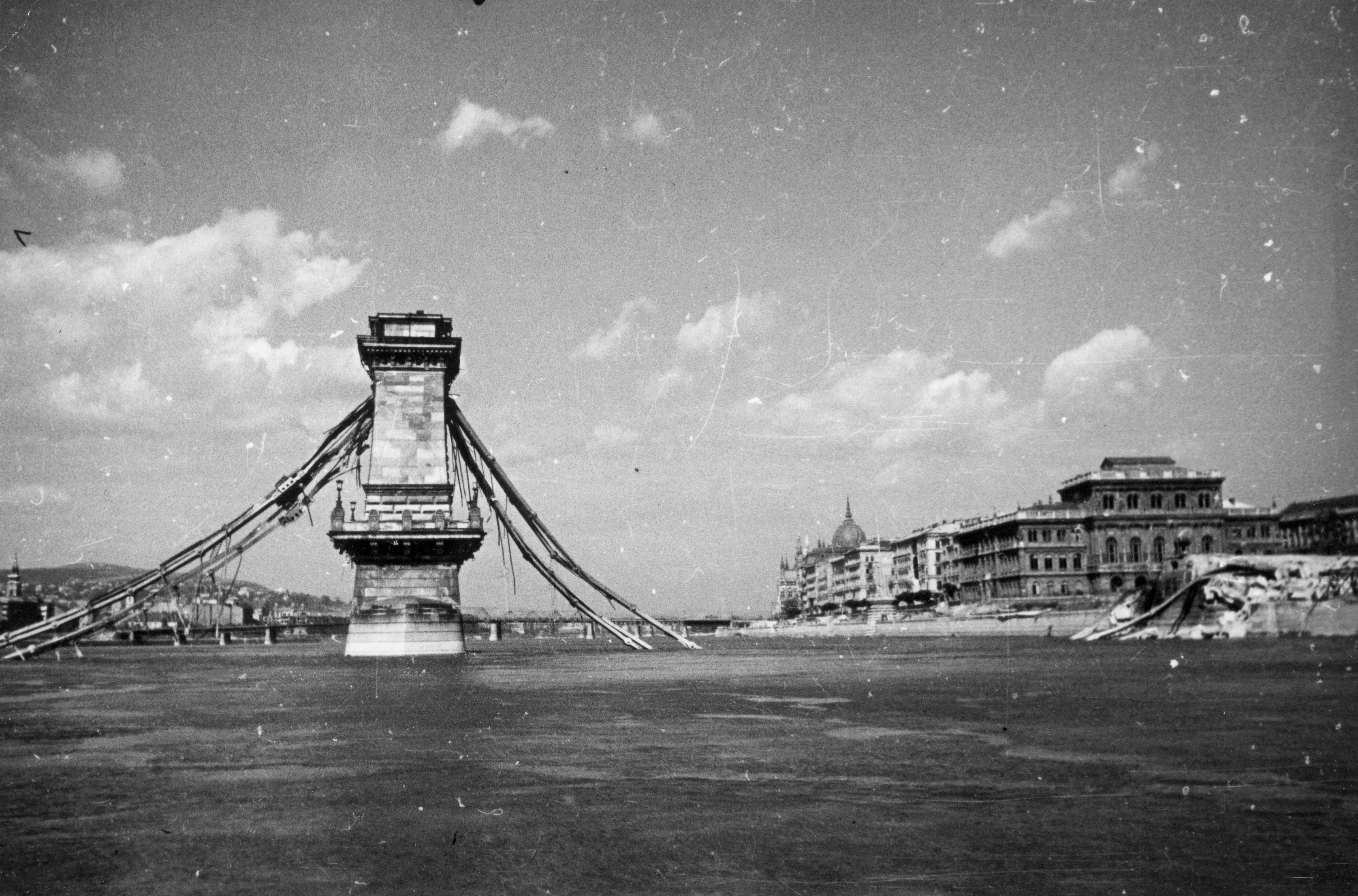 Budapest, a lerombolt Lánchíd, háttérben a Parlament és a Kossuth híd.